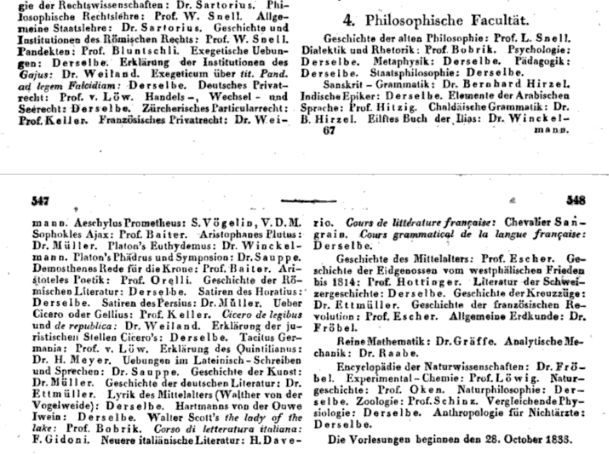 Vorlesungsverzeichnis der Philosophischen Fakultät der Universität Zürich, Wintersemester 1833/34